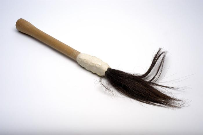 Priesterattribuut. Deze magische bezem wordt gebruikt door de obiaman, een veel geraadpleegde priester-medicijnman-waarzegger in de winti-religie.. Magische bezem van een medicijnman